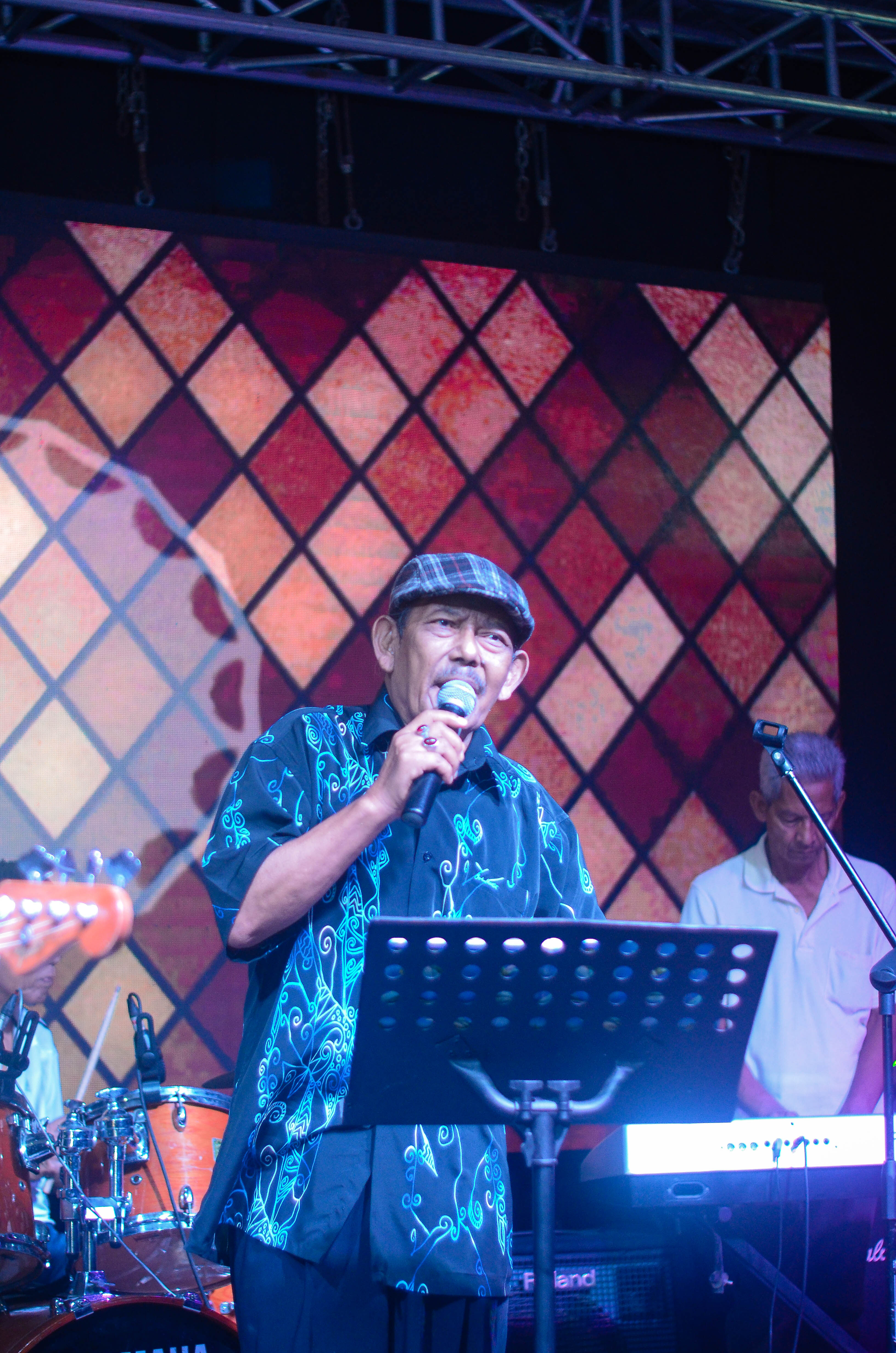 Husaini B sewaktu mendendangkan lagu irama 60an di Semerah, Batu Pahat sempena jamuan Hari Raya.